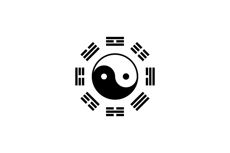 八卦太极旗，1911年辛亥革命山西光复时用旗